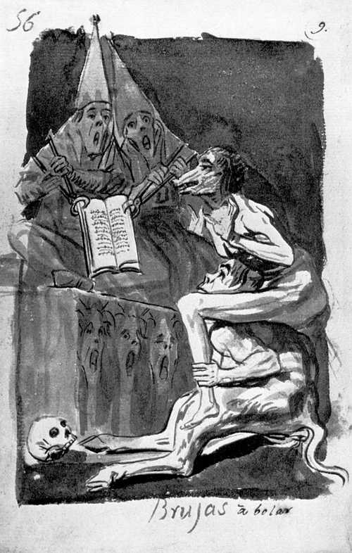 Dibujo nº 56 del Álbum B o de Madrid. También sirvió como preparatorio del capricho nª 70.